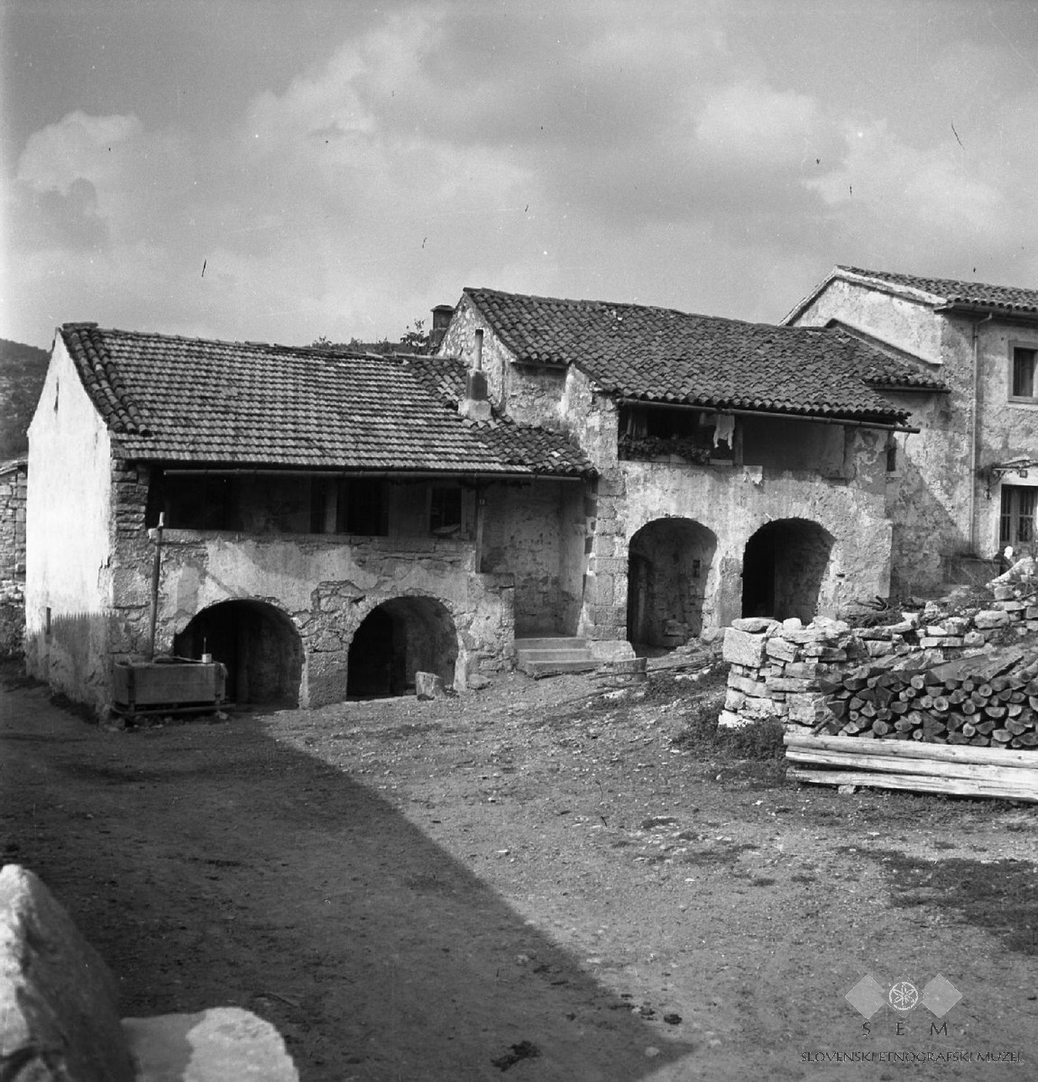 Žejane, hiša Jozo in Jandrina.